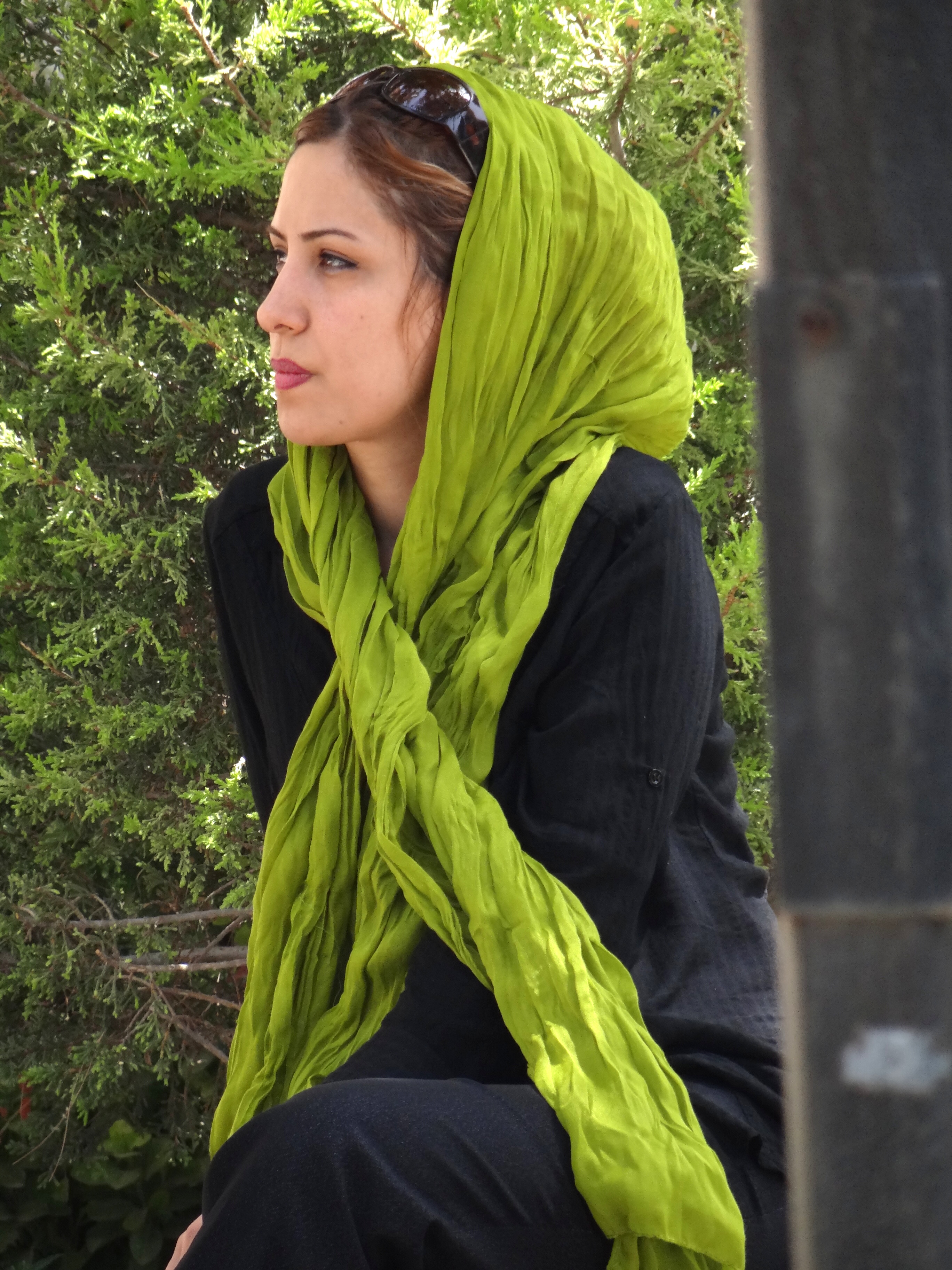 Young Iranian Woman at Manar Jomban (Shaking Minarets) - Isfahan - Central Iran